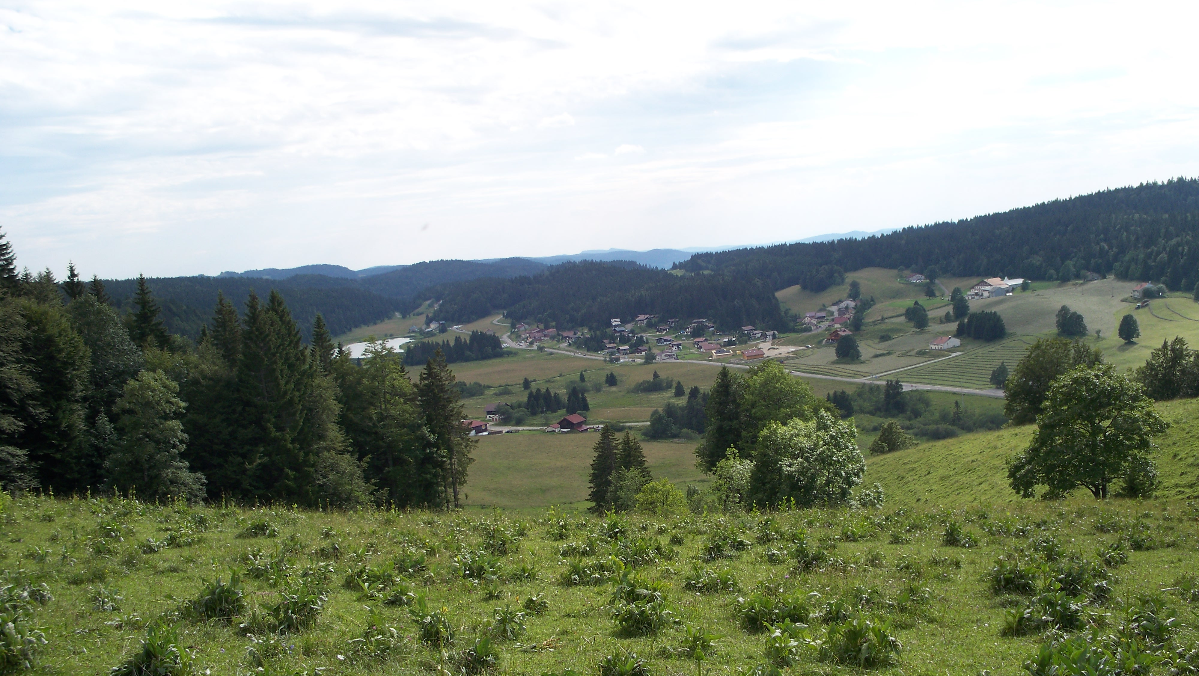 Lamoura et la Combe du Lac (Massif du Jura)